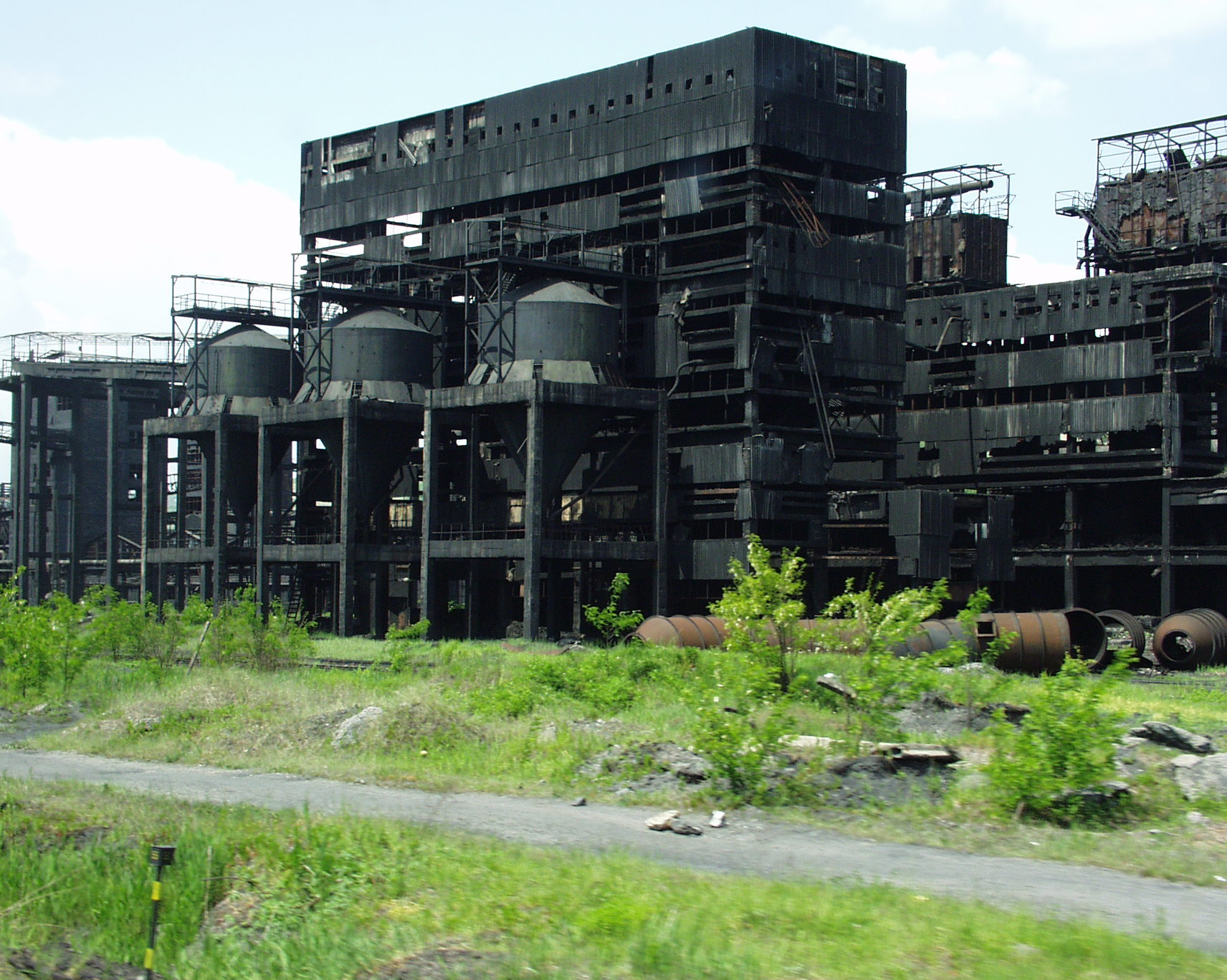 Frontalaufnahme der Rußfabrik in Copşa Mică